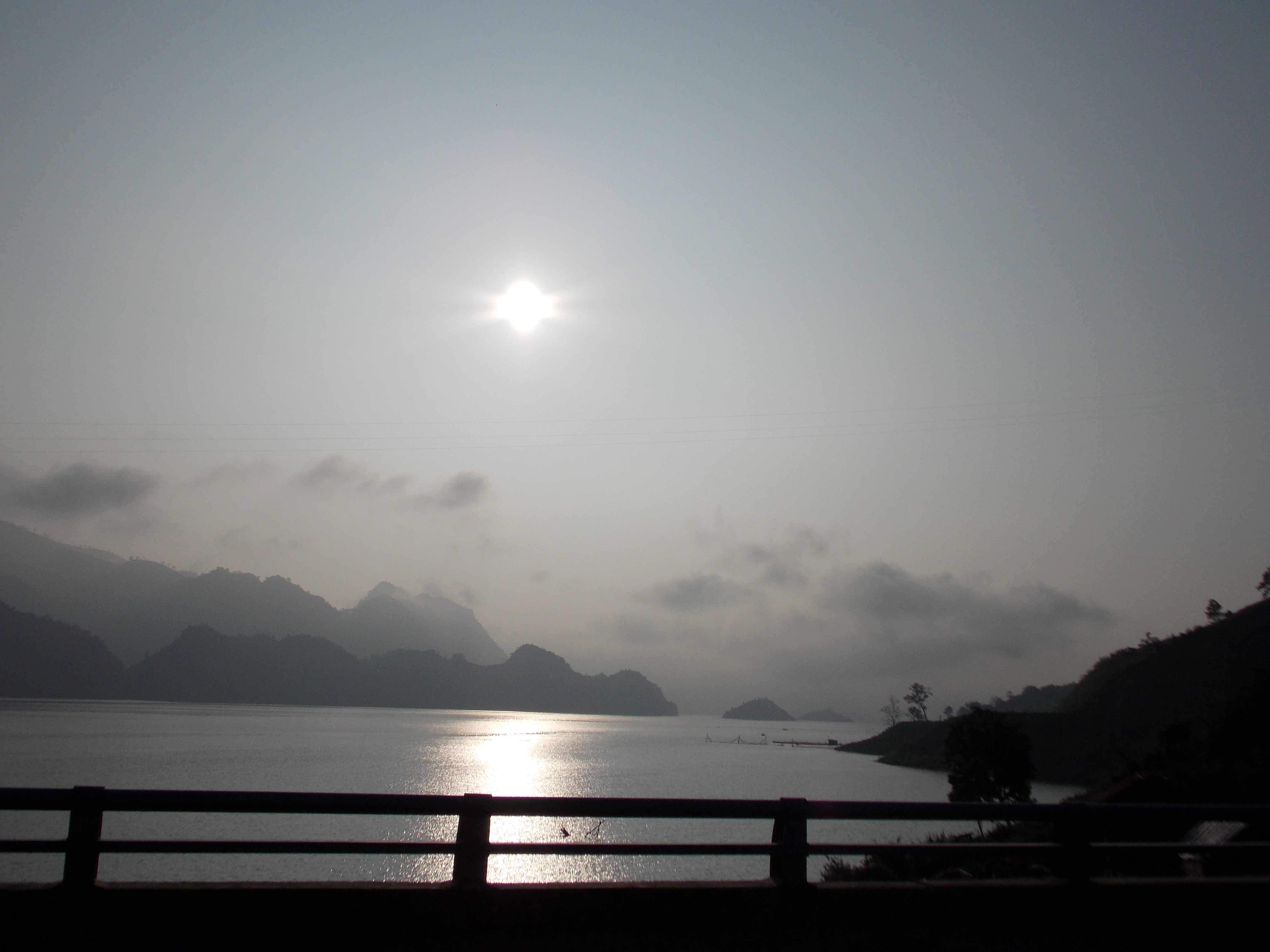 Nậm Cần, Tân Uyên, Lai Châu, Vietnam